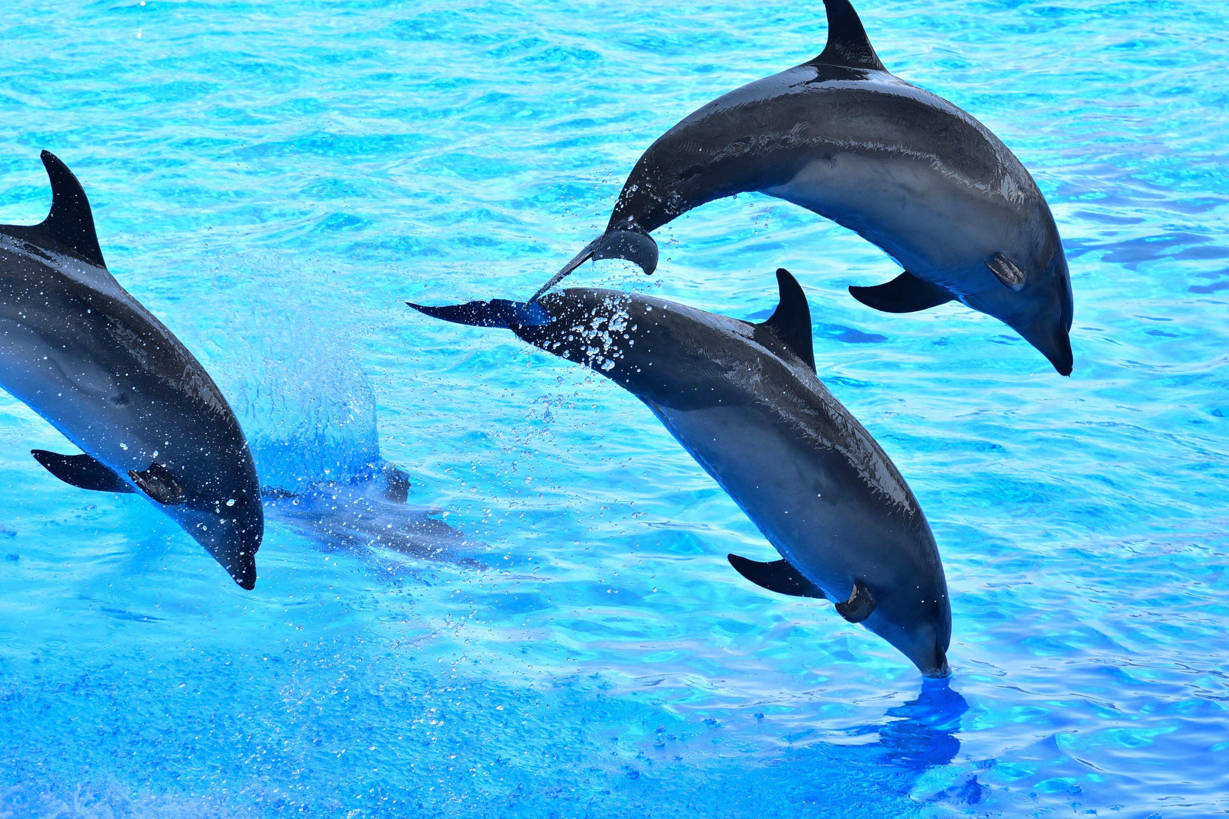 名古屋港水族館のイルカパフォーマンス